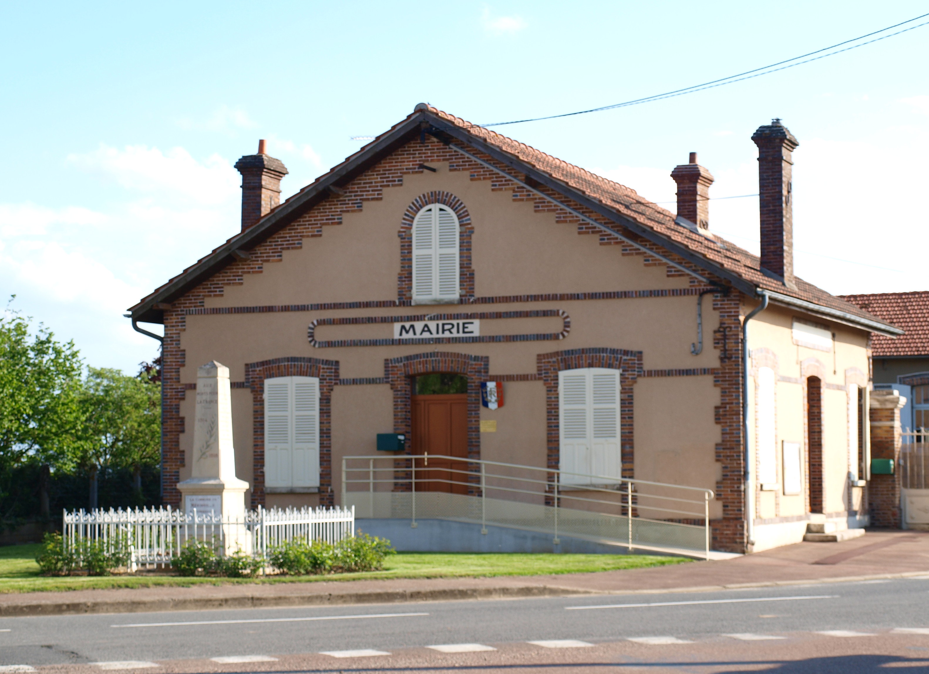 Mérinville (Loiret, France), mairie et monument aux morts.